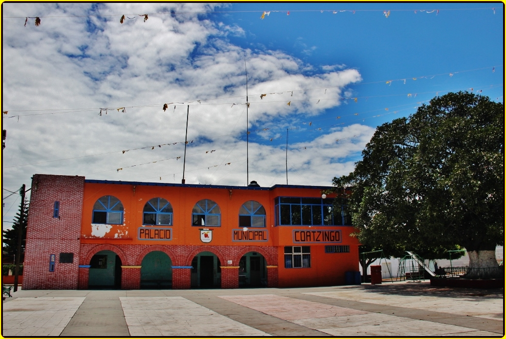 Palacio municipal de Coatzingo, Puebla, México.